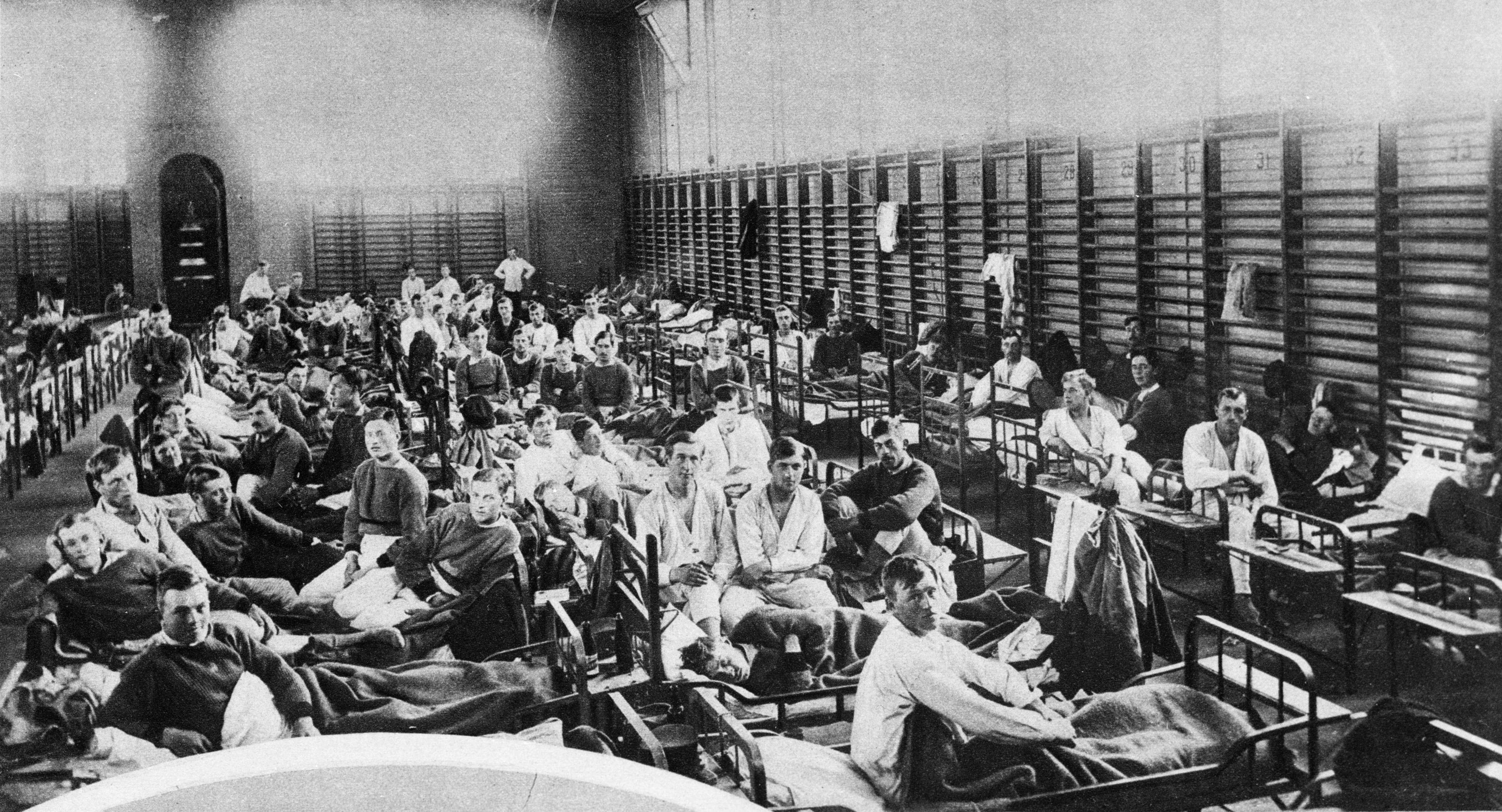 Spanska sjukan 1918. Regemente i Boden. Sjuka ligger i gymnastiksal. Vecko-Journalens praktupplaga 1918. Ur Nordiska museets arkiv, NMA.0033615